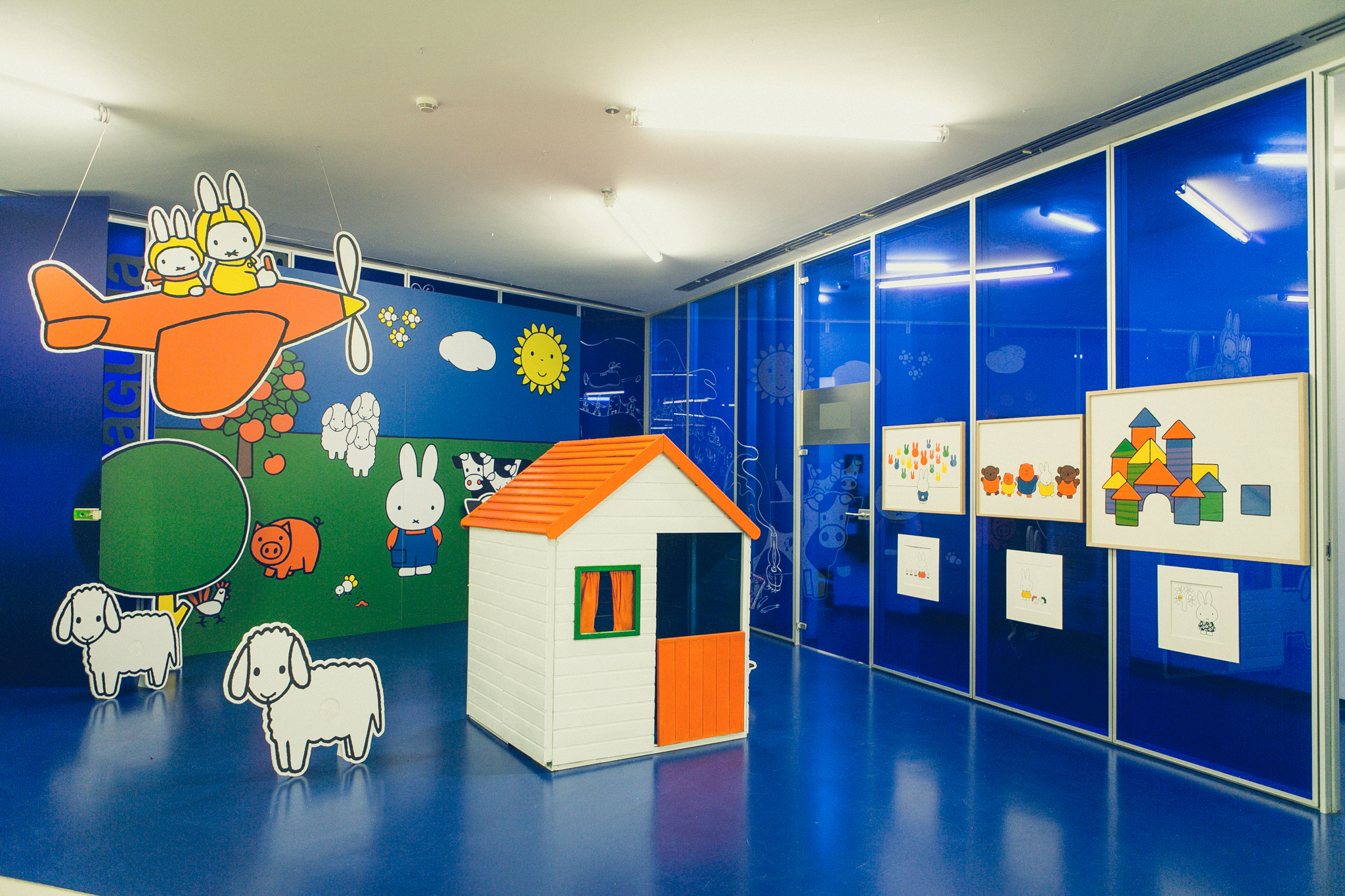 Erakusketa/Exposición Aiete Kultur Etxea Argazkilaria/fotógrafa: Lorena Otero